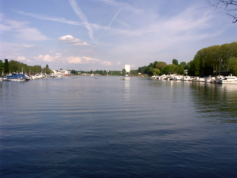 Das Becken des Schiersteiner-Hafens in Wiesbaden/Hessen. Rechts hinter den Booten liegt die Hafenausfahrt in den Rhein.